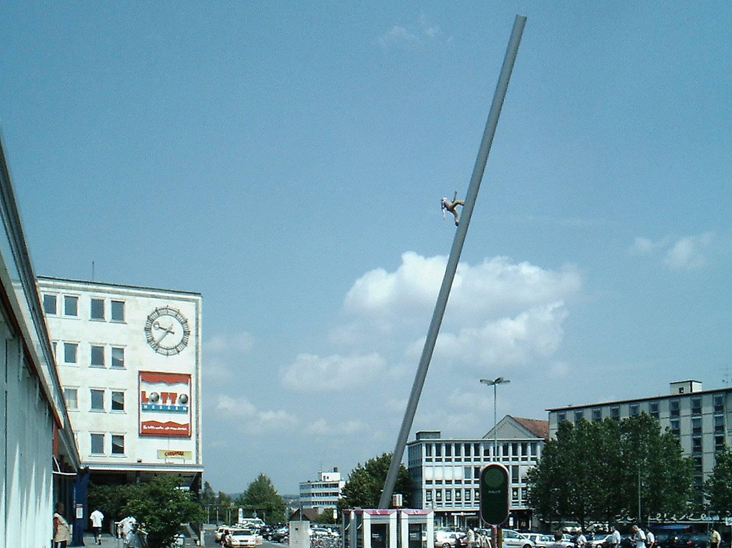 "Himmelsstürmer" vor dem Kasseler Kulturbahnhof Auf dem Platz vor dem Kulturbahnhof in Kassel (Hauptbahnhof) steht der Himmelsstürmer (Man walking to the sky) des Künstlers Jonathan Borofsky, realisiert zur documenta 1992. Das Stahlrohr mit dem himmelwärts schreitenden Mann ist 25 Meter lang. Aufgrund des großen Anklangs bei den Kasseler Bürgern wurde das Kunstwerk von der Stadt Kassel für 585.000 DM angekauft. Die Kaufsumme wurde durch eine Bürgerinitiative, verschiedene Spendenaktionen und öffentliche Gelder aufgebracht.